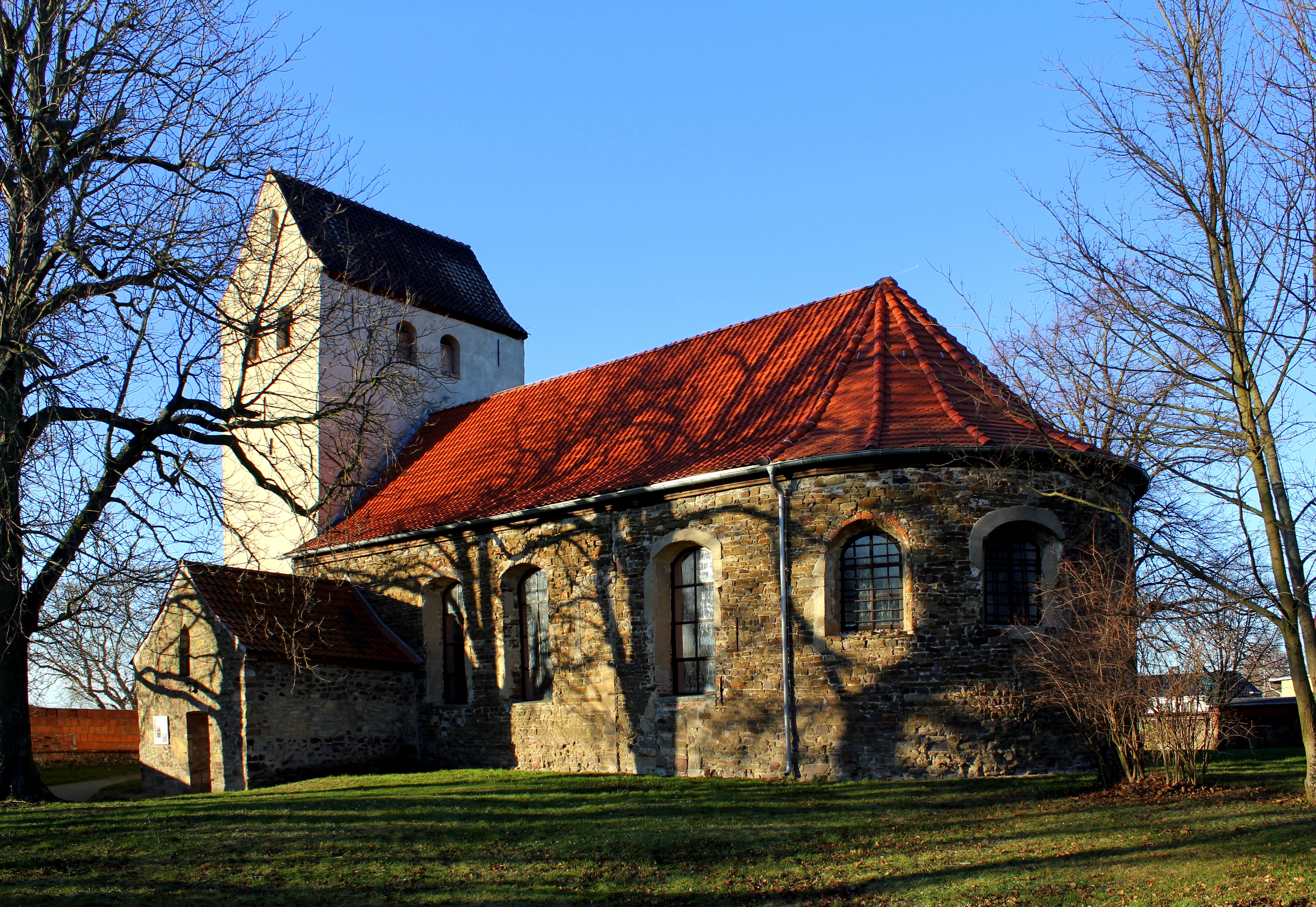 Kirche St. Petri, Am Kirchberg, Ochtmersleben